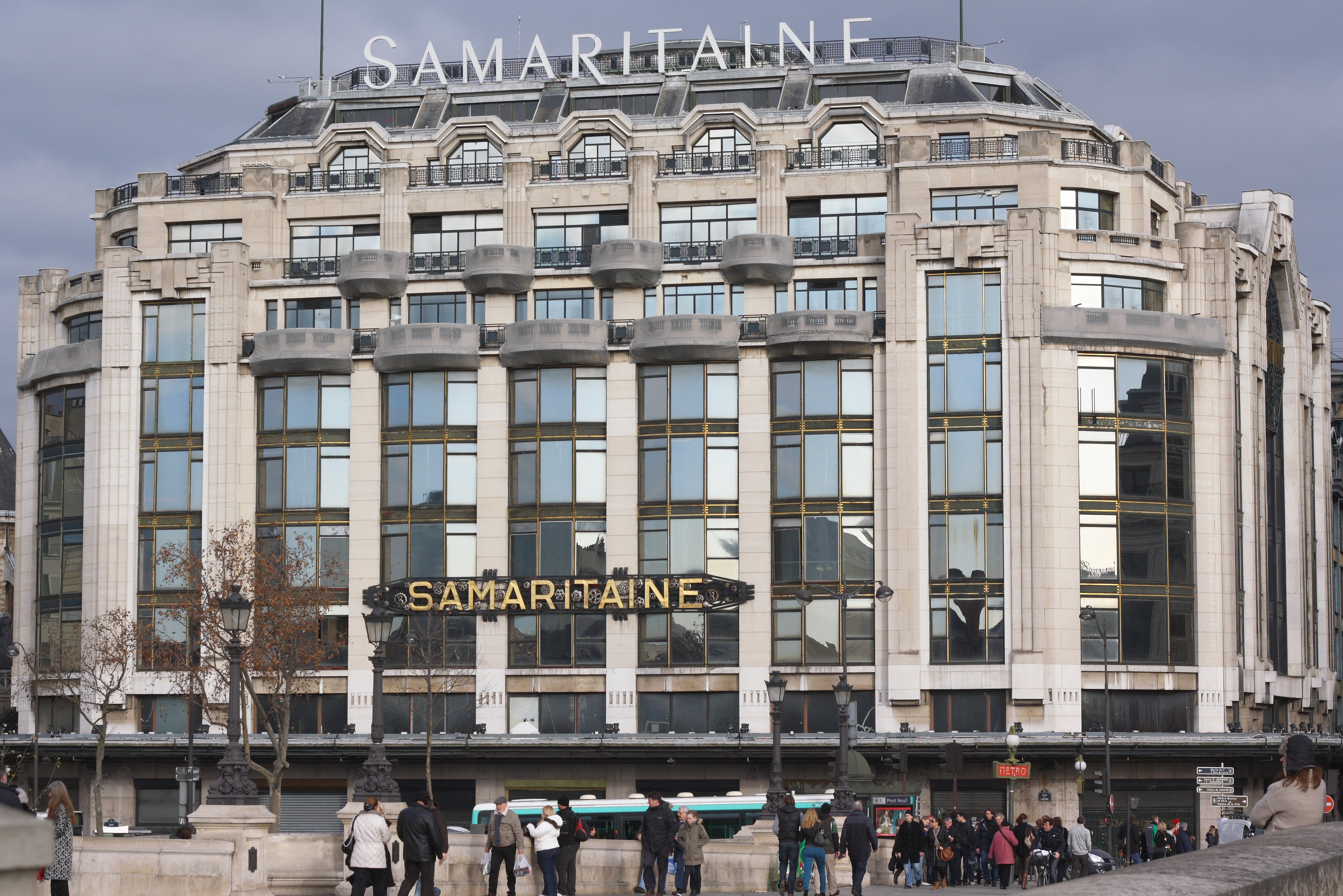 Ehemaliges Kaufhaus La Samaritaine, Magasin 2, Quai du Louvre/Rue de la Monnaie/Rue Baillet/Rue de l'Arbre Sec im 1. Arrondissement von Paris, Fassade Quai du Louvre